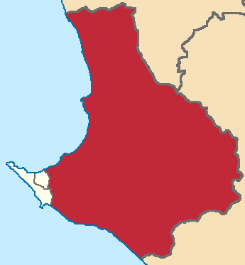 Mapa localizador del cantón en Santa Elena, Ecuador